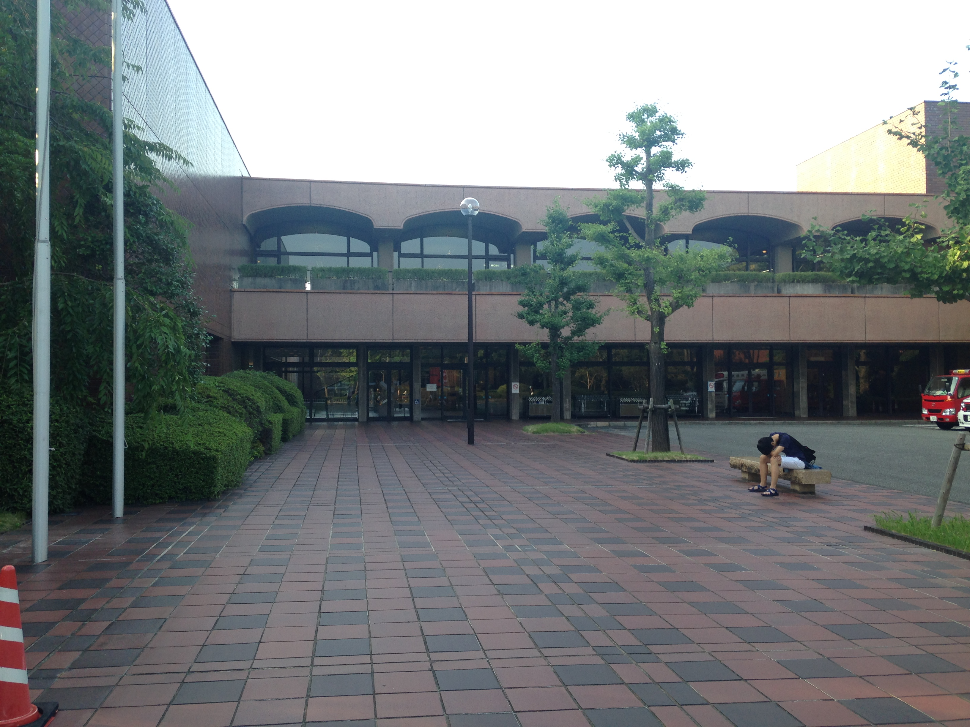 福岡市美術館